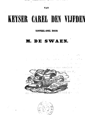 19de-eeuwse heruitgave van een werk van Michiel de Swaen, rederijker uit Duinkerke